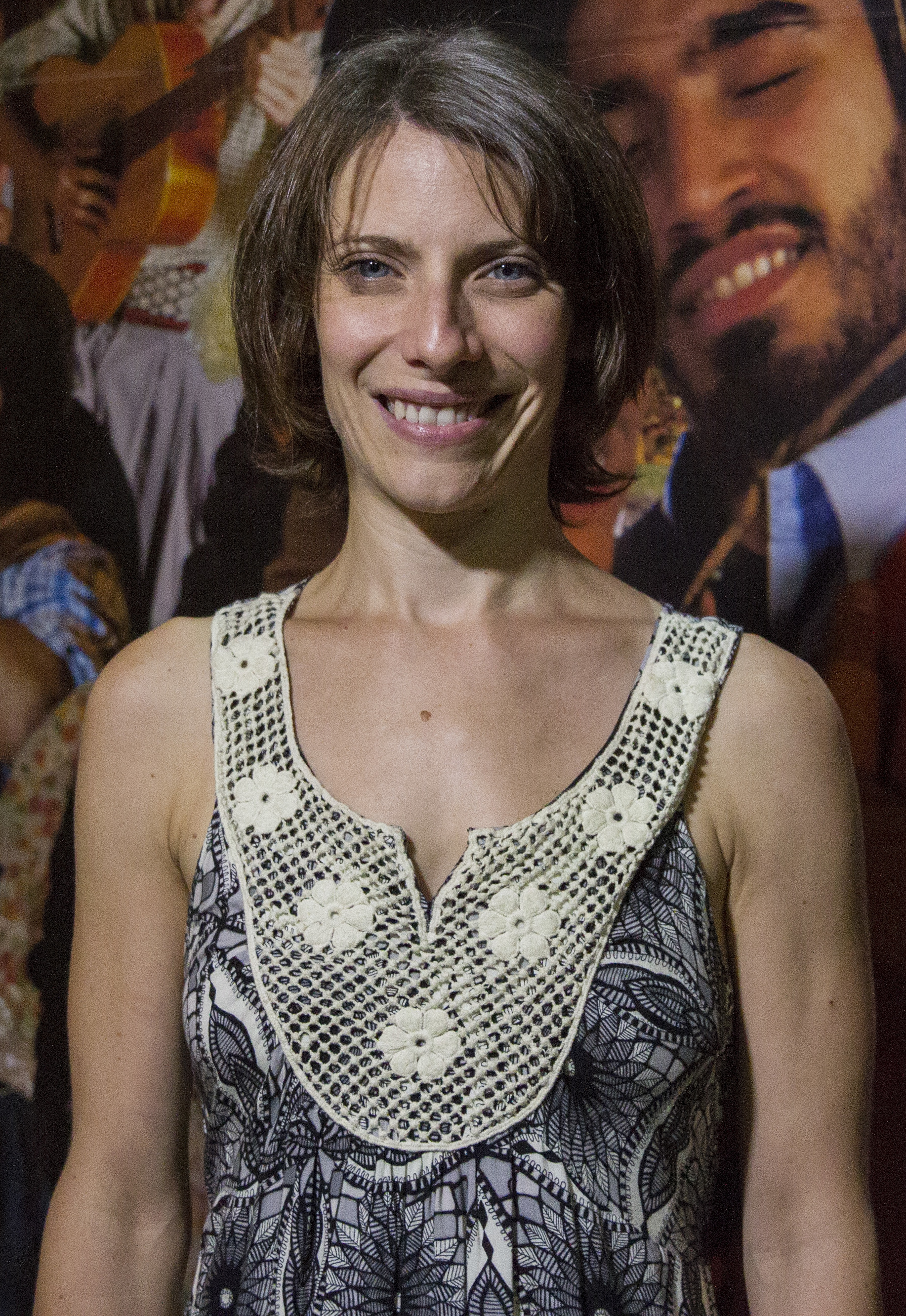 Corrientes, 26 de Enero de 2017 Elena Rogers, Soledad Villamil, Hilda Lizarazu y Valeria Gomez participaron de la 27 Fiesta Nacional del Chamamé en la ciudad de Corrientes. Juntas le dieron al chamamé un toque femenino en "Chamame Mujer" . Foto:Silvina Frydlewsky / Ministerio de Cultura de la Nación